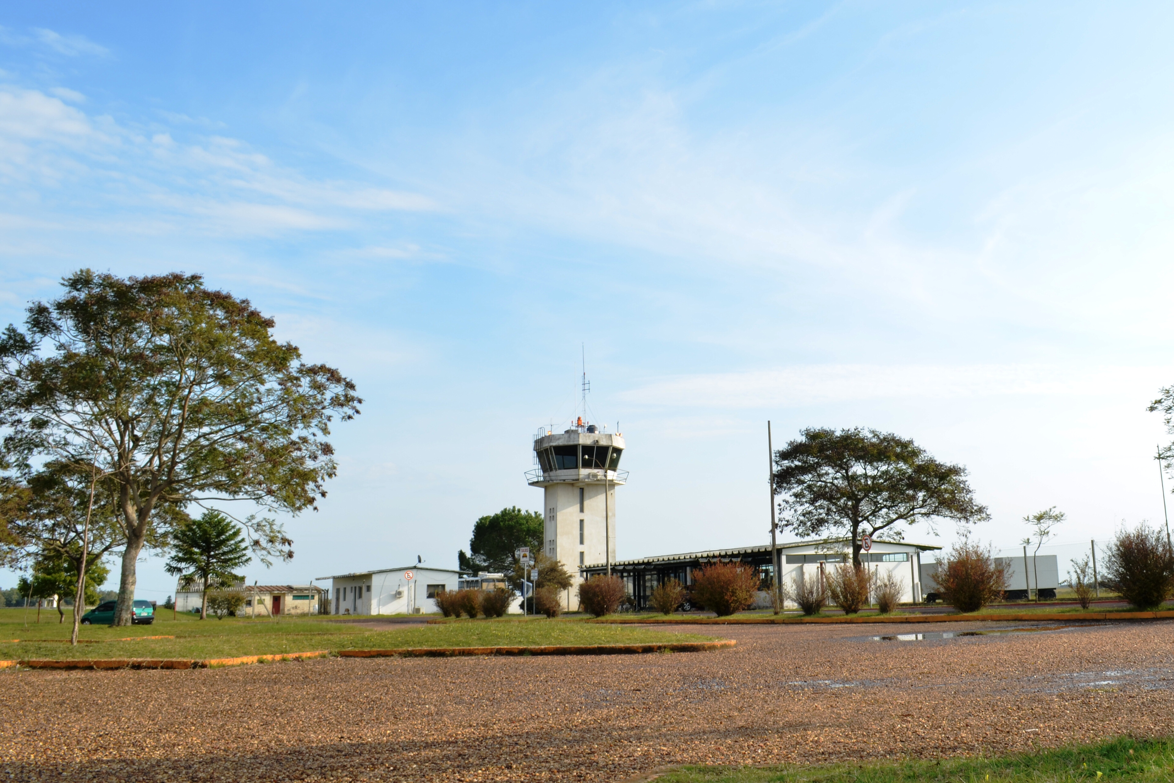 Vista del Aeropuerto de Nueva Hespérides en Salto